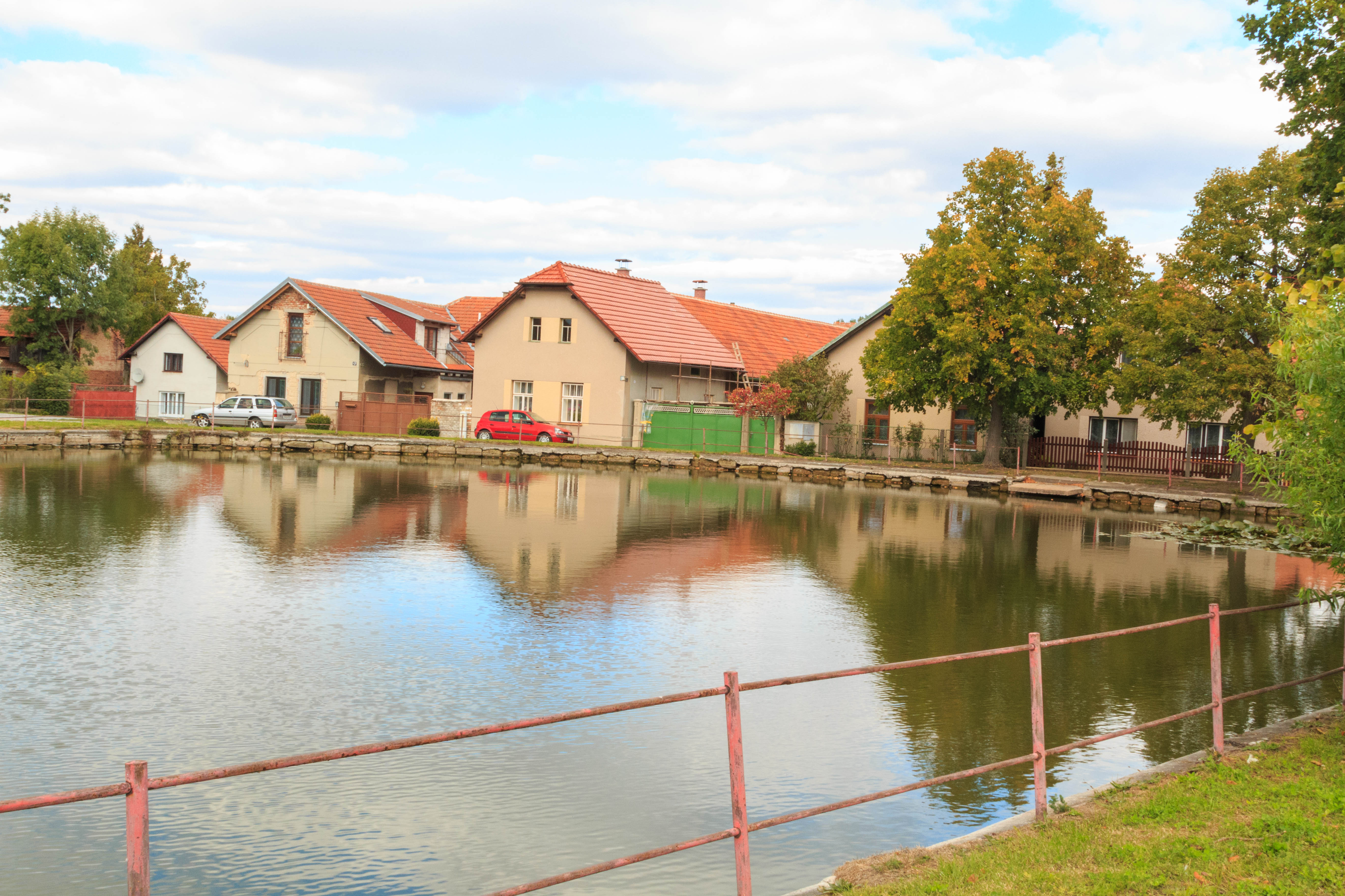 Lhota u Chroustovic čp. 17